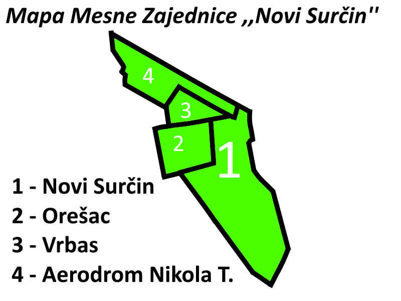 Srpski (latinica): Mapa Mesne Zajednice Novi Surčin